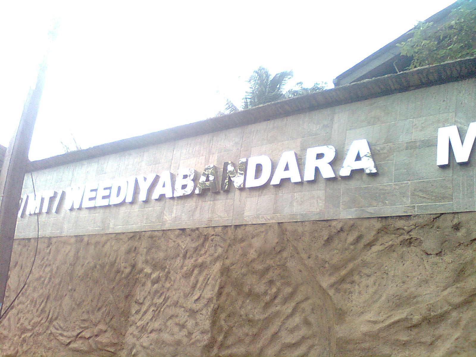 සිංහල: පාරට පෙනෙන අයුරු